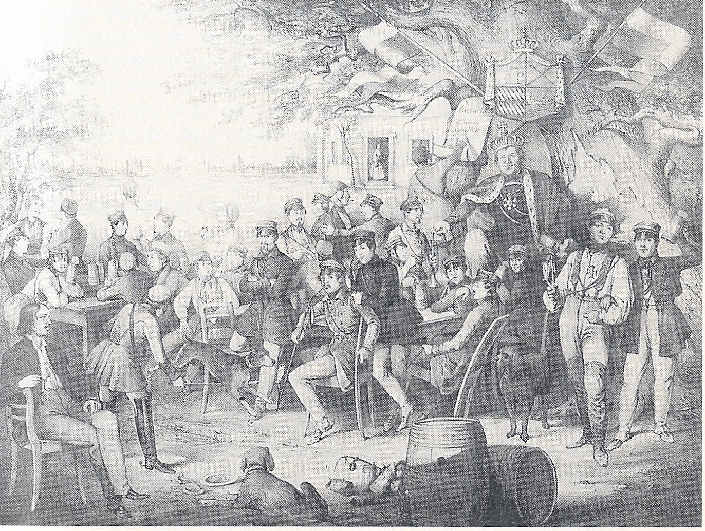 Bierherzogtum Leipziger Studenten, Lithographie von 1847, Rechte abgelaufen, Public Domain